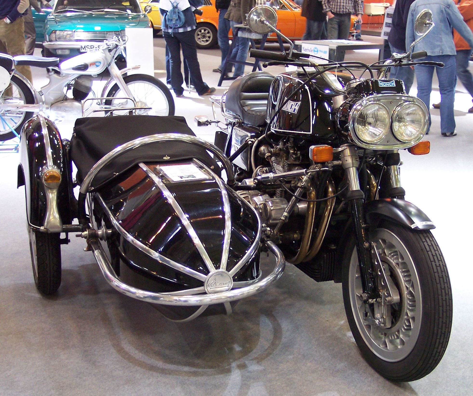 Münch Gespann